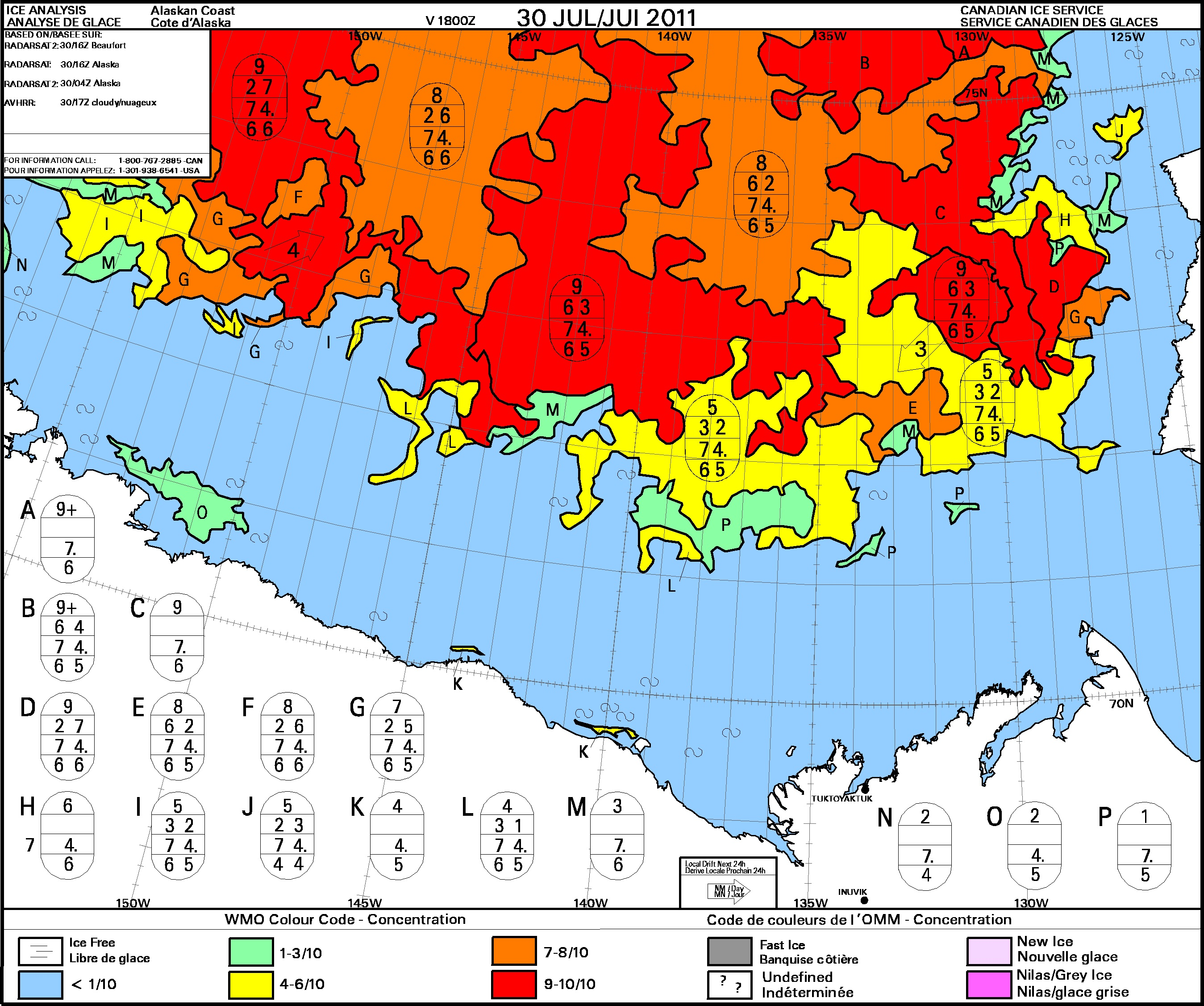 Carte quotidienne d'analyse des glaces mise à disposition par le Service Canadien des Glaces